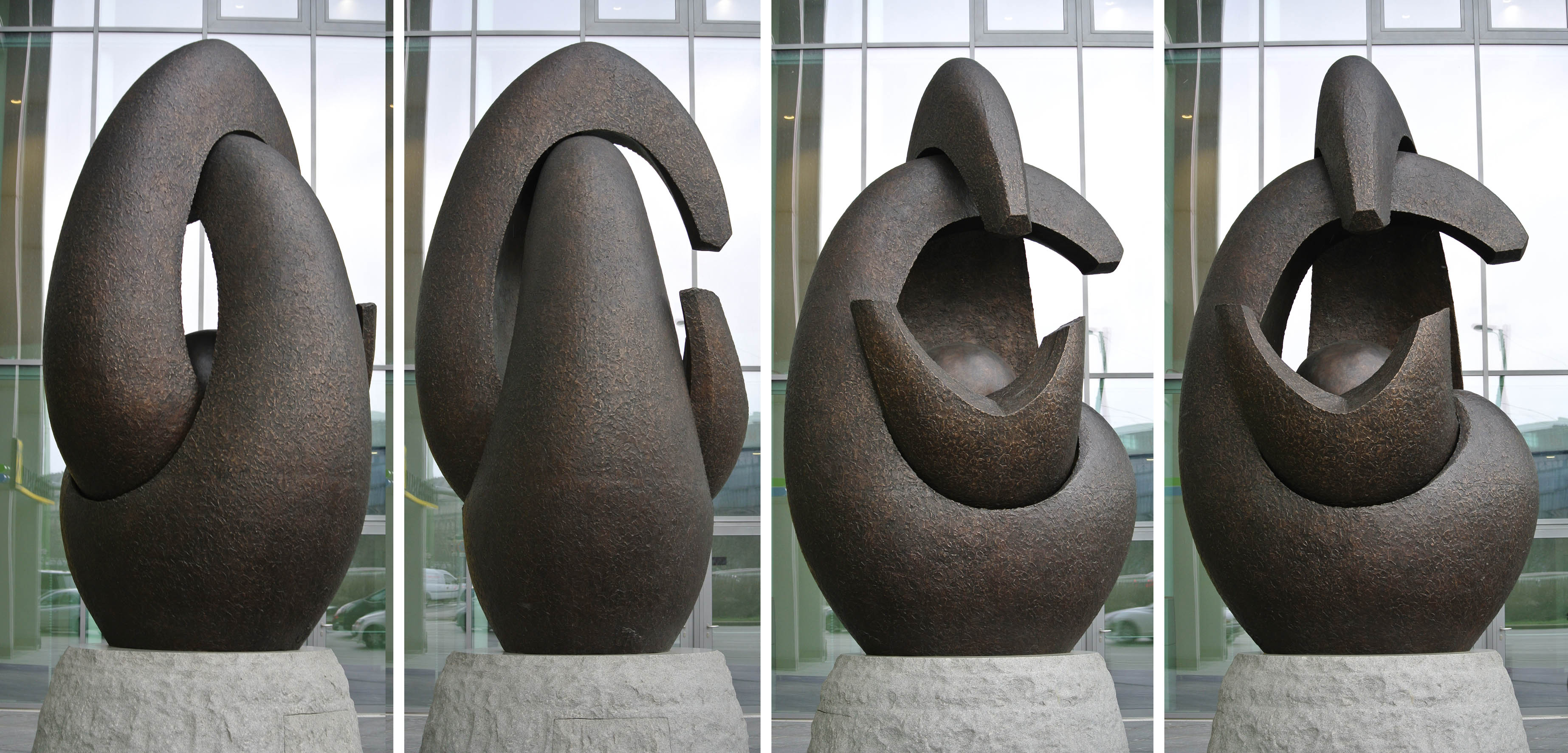 Richard Agreiter Prof., österreichischer Bildhauer (* 25. März 1941 in Strobnitz). Nach dem Besuch der Kunstschule in Innsbruck kam er 1969 an die Akademie der Schönen Künste nach Brüssel, wo er sein Studium mit den höchsten Auszeichnungen abschloss. Richard Agreiter ist freischaffender Künstler in Steinberg am Rofan. Die Skulptur befindet sich vor dem Bürogebäude der Raiffeisen-Holding NÖ-Wien, F.W.Raiffeisen-Platz 1; 1020 Wien. Enthüllung: 30.Juni 2014 Eine sich langsam um die eigene Achse drehende Plastik. Thema: Unablässiges Werden des Lebens, der Welt und des Kosmos. Skulptur: ca.3 Meter Höhe, Gewicht 2500kg (1700kg Bronze). Sockel: ca. 3000kg Granit aus dem Waldviertel.